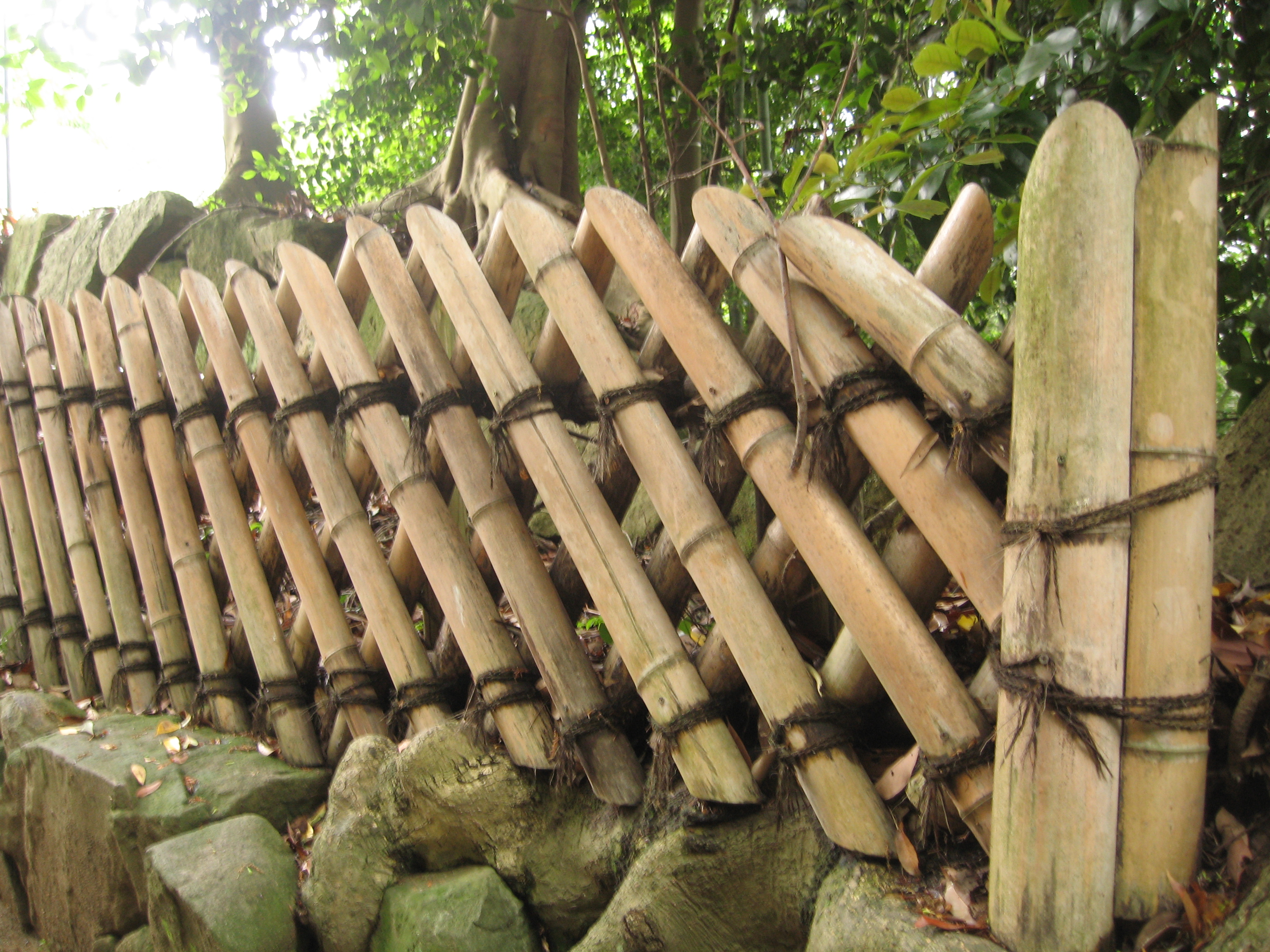 彦根城の竹垣、竹矢来